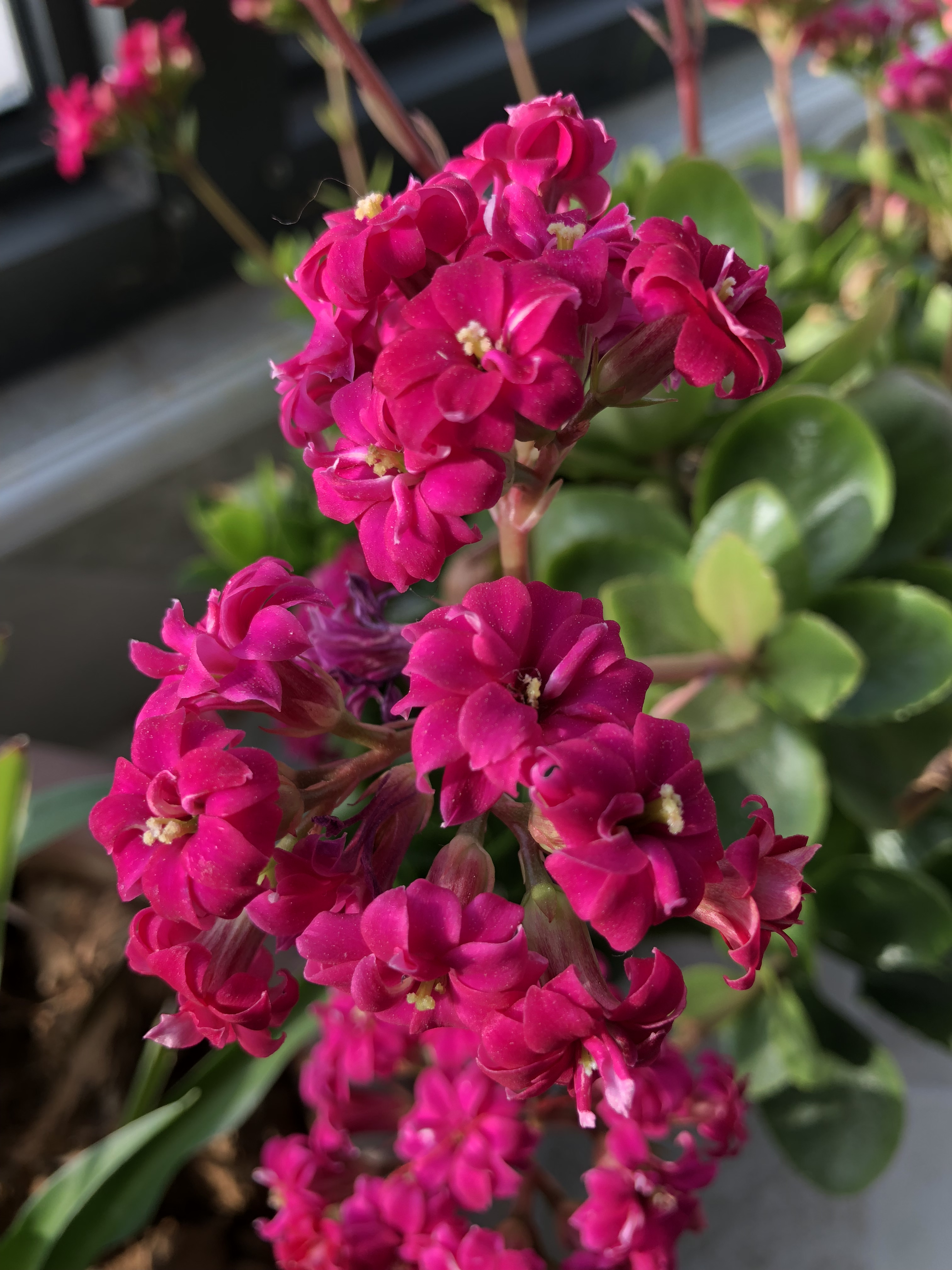 重瓣长寿花